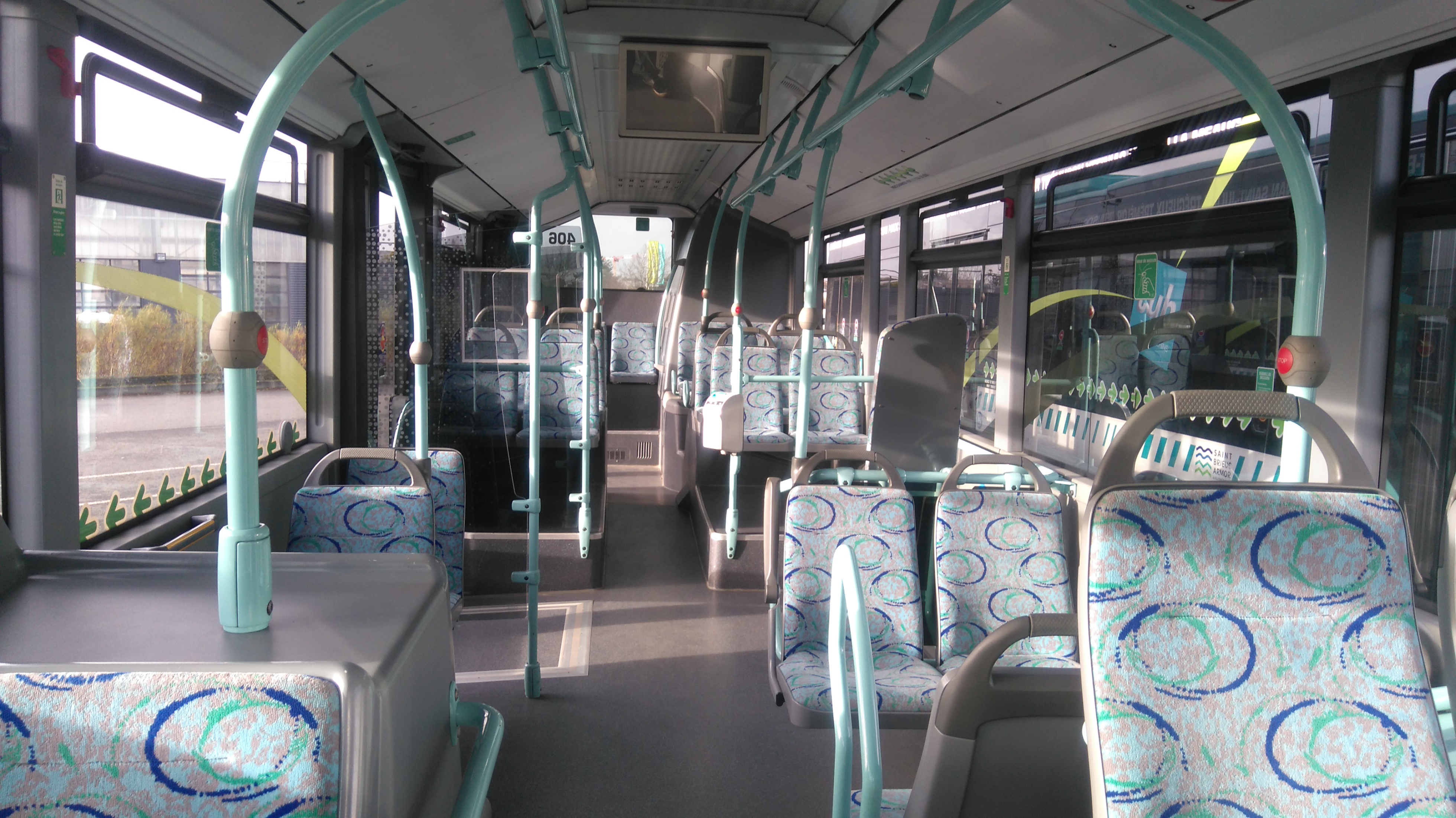 Mercedes-Benz Citaro C2 n°406 - TUB - Intérieur